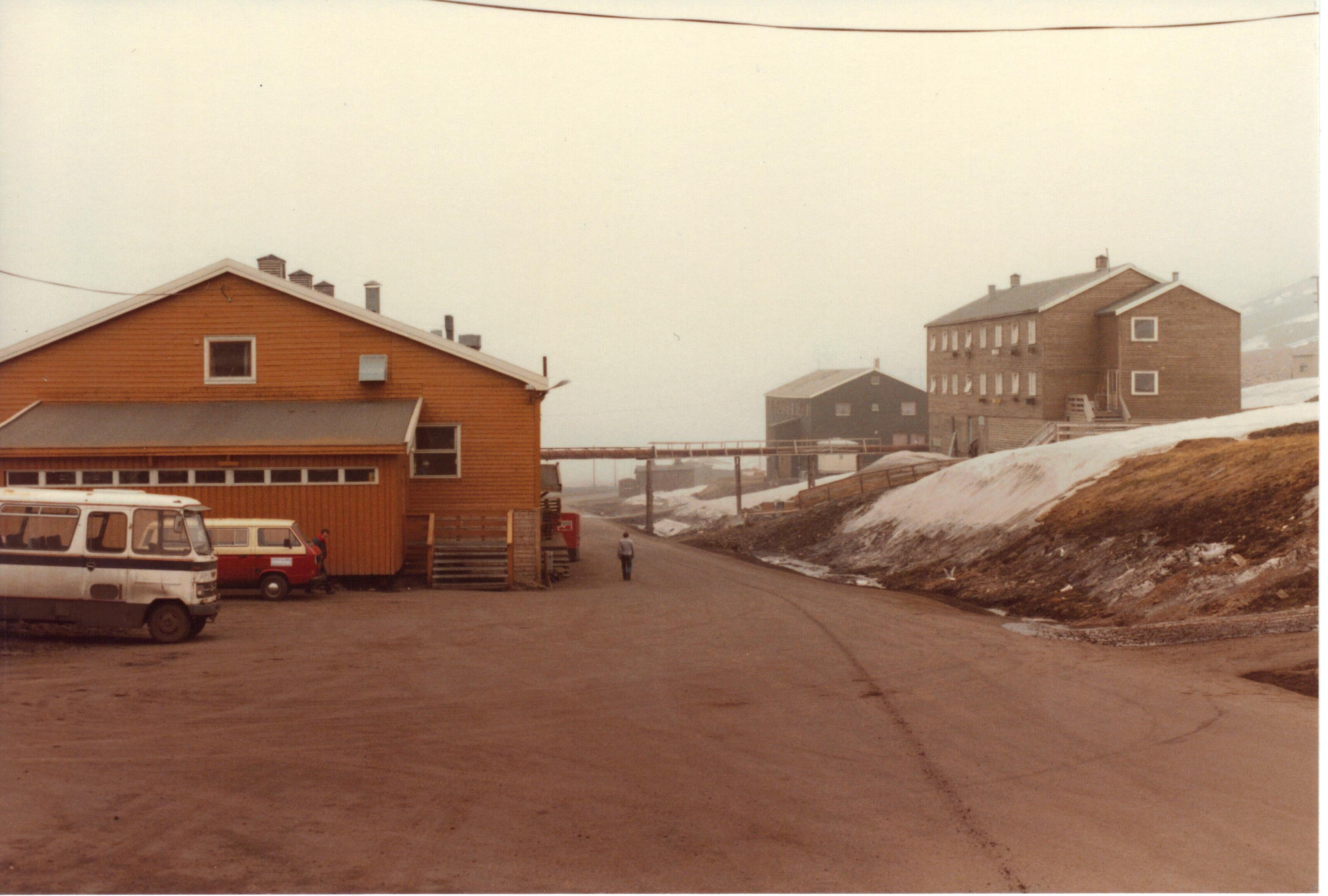 Deler av Nybyen i 1981. Arbeidermesse til venstre, Jomfruburet til høyre.